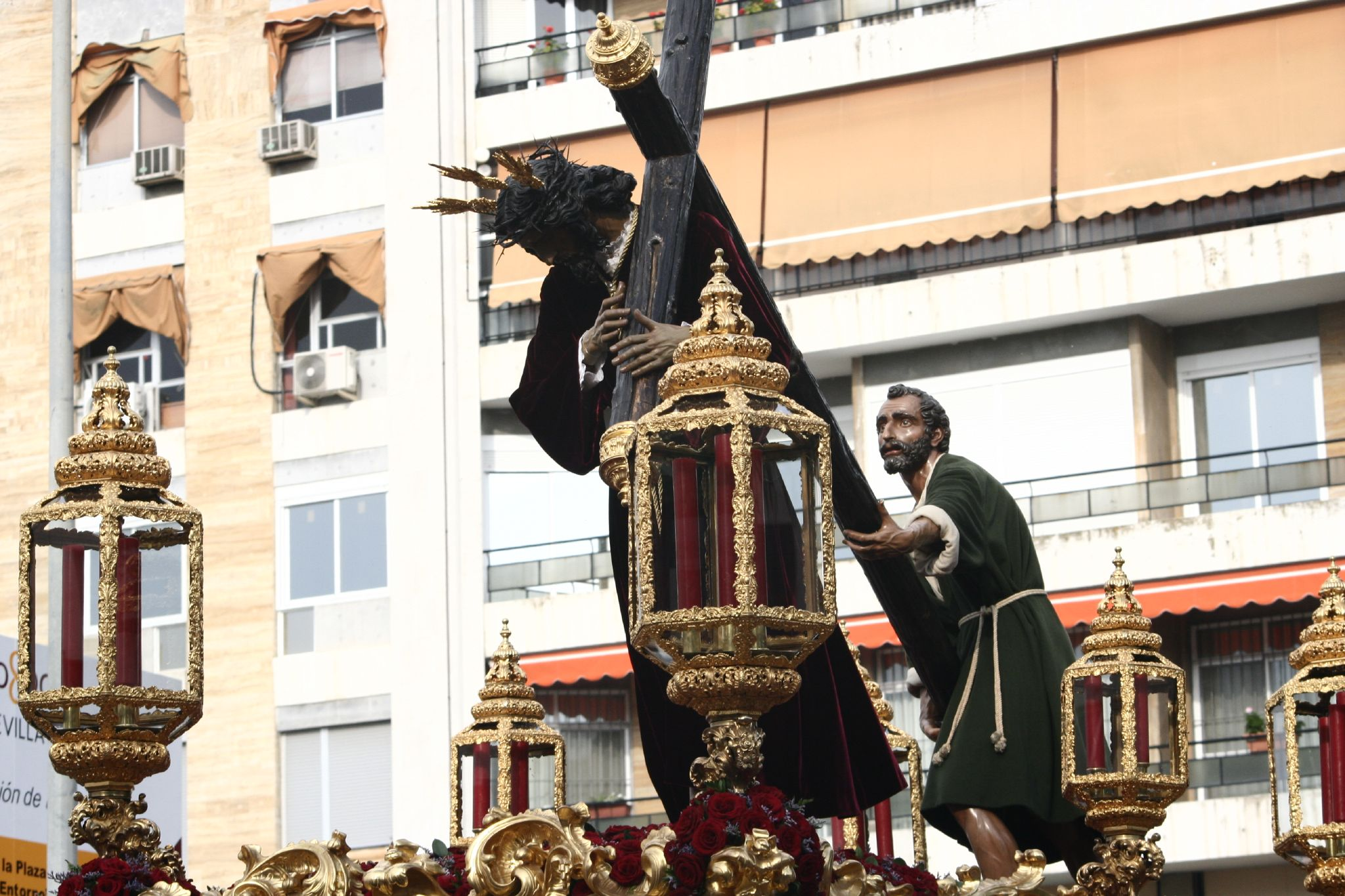 San Roque. Semana Santa en Sevilla. Año 2006 Foto realizada y propiedad de Ángel Chacón